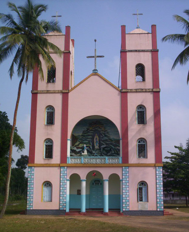 പള്ളിക്കുന്ന് പള്ളിയുടെ ചിത്രം